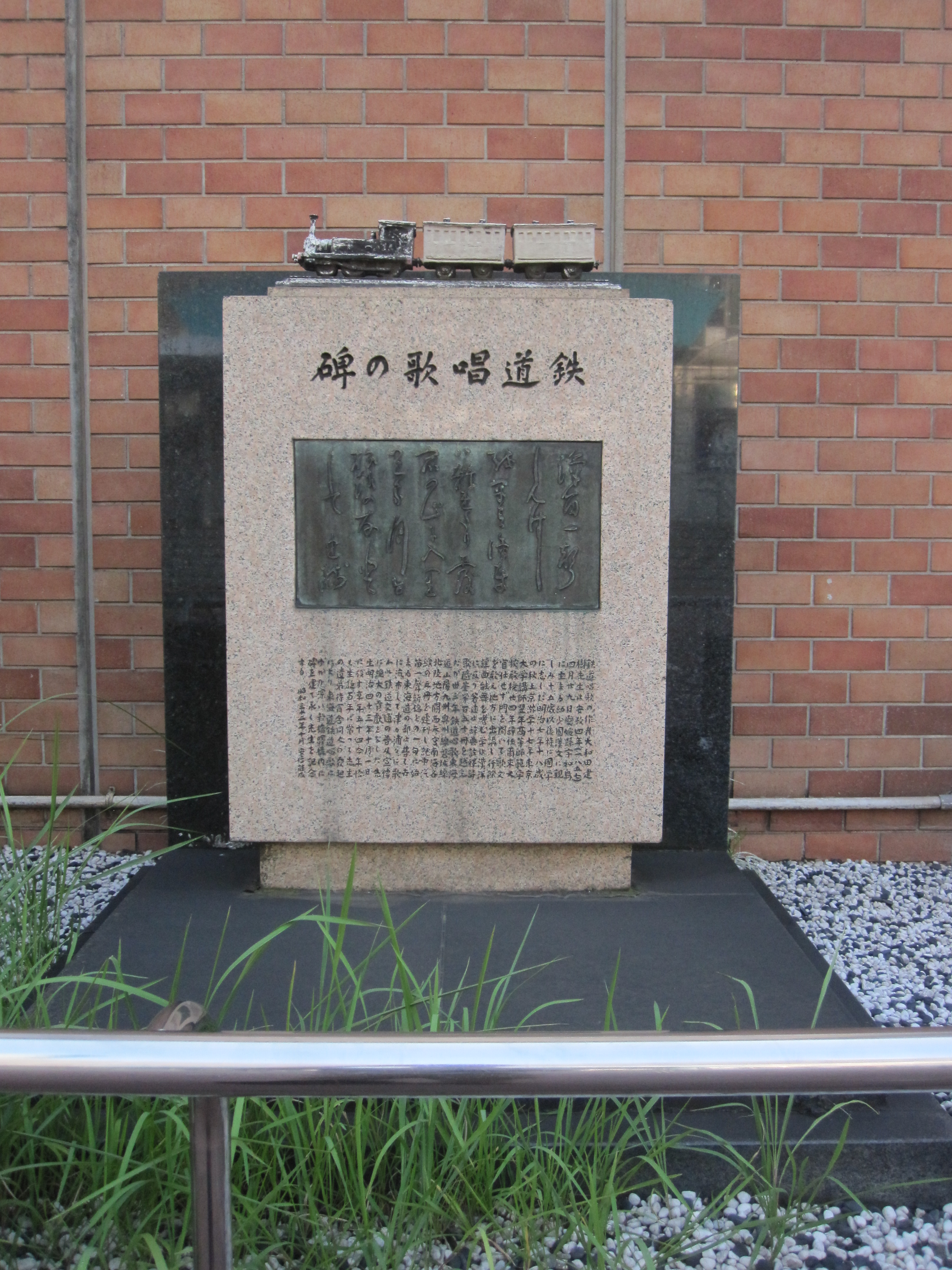 新橋駅汐留口前に設置されている『鉄道唱歌の碑』（1957年（昭和32年）10月4日建立）。中央銘板は大和田建樹直筆『鉄道唱歌』東海道篇の第1番の歌詞。その下部の碑文は安倍能成の揮毫。石碑上部には第1号機関車の模型が乗る。安倍能成による碑文は以下の通り。鉄道唱歌の作者大和田建樹先生は安政四年（一八五七）四月廿九日愛媛縣宇和島に生まる幼少國漢文に親しみ十五歳以後特に國学に志した明治七年十八歳の秋上京遊学十七年東京大学講師翌年高等師範学校教授廿四年辞任爾来又官仕せず門を開いて歌文を教え地方に出講し行餘謡曲能舞を嗜む学は漢洋に亘り著述は辞典註釋詩歌随筆等百五十冊を越えたが丗三年鉄道唱歌東海道山陽九州奥州線磐城線北陸地方關西参宮南海各線の五冊を連刊就中汽笛一聲新橋をの一句に始まる東海道の部は普く卋に流布して津々浦々に歌われ鉄道交通の普及宣傳に絶大の貢献をなした先生明治四十三年十月一日に歿す享年五十四今年恰も生誕百年に當って先生の遺弟待宵舎同人の發起により東海道鉄道唱歌にゆかり深い新橋驛構内に碑を建て永く先生を記念する 昭和三十二年十月安倍能成